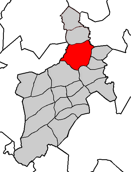 Situación da parroquia de Mabegondo no concello de Abegondo